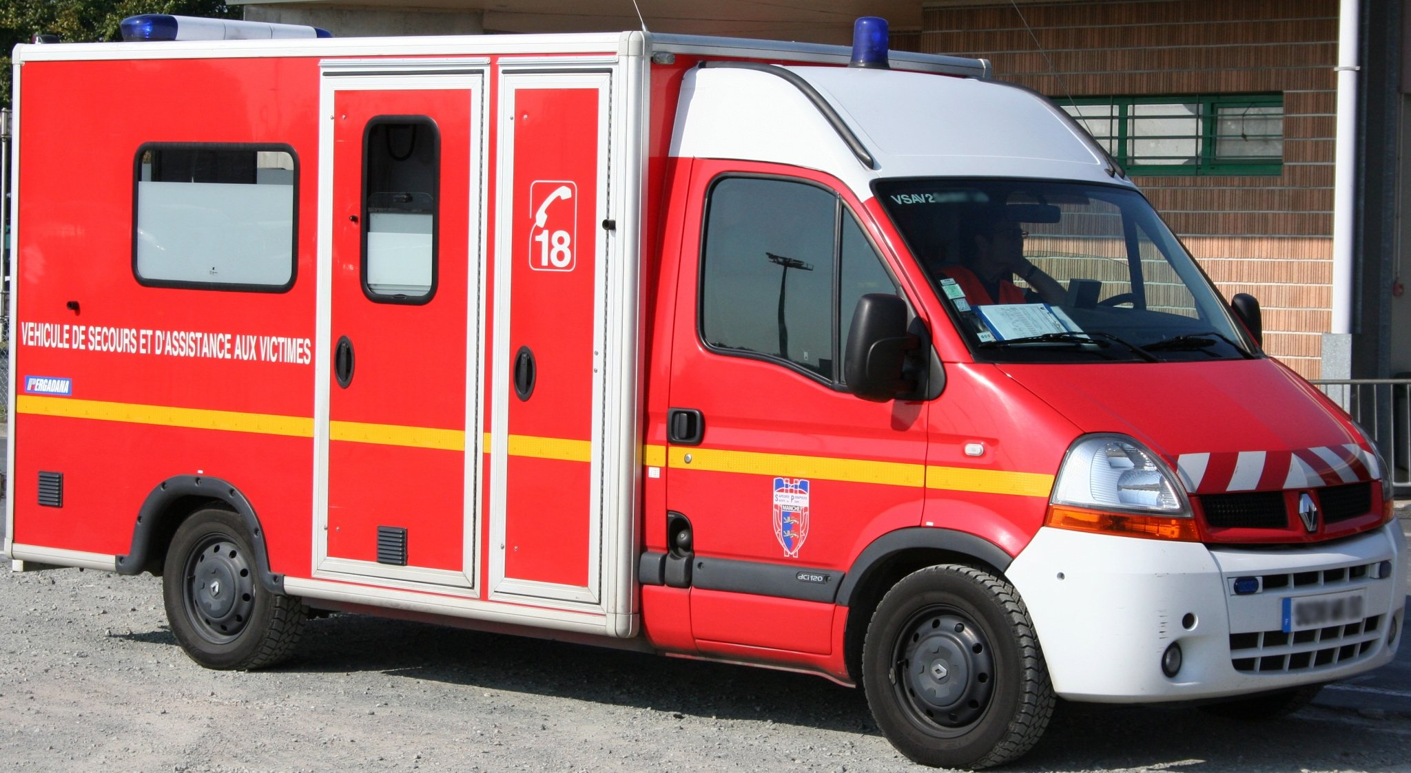 Véhicule VSAV des pompiers en France